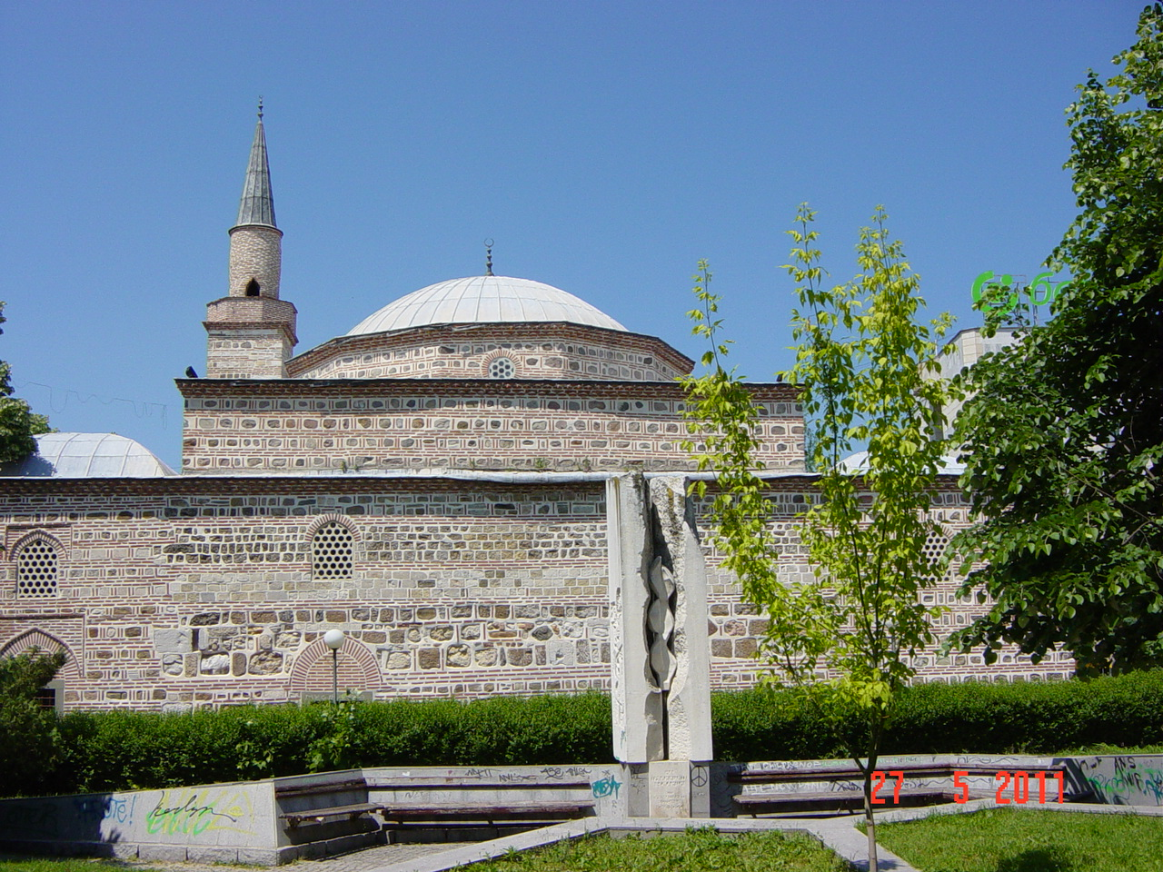 Ямбол